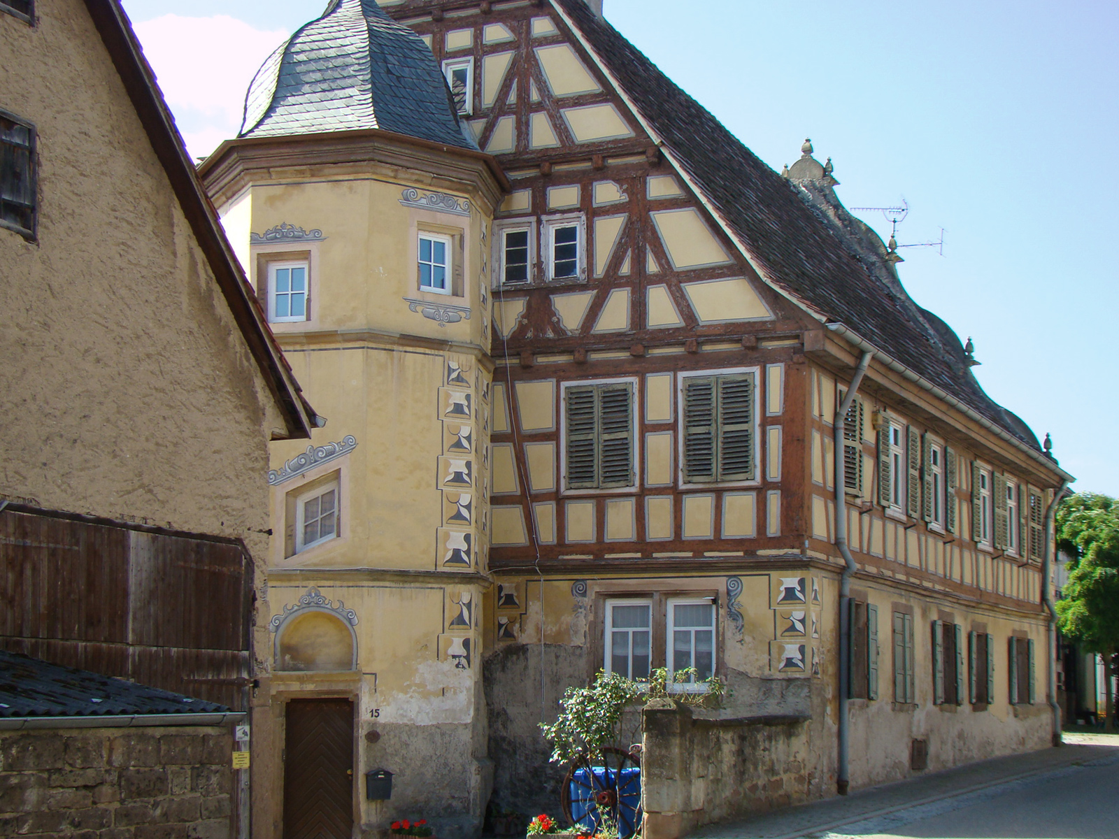 Amtshaus des Deutschordens von 1604 in Stockheim (Württemberg)